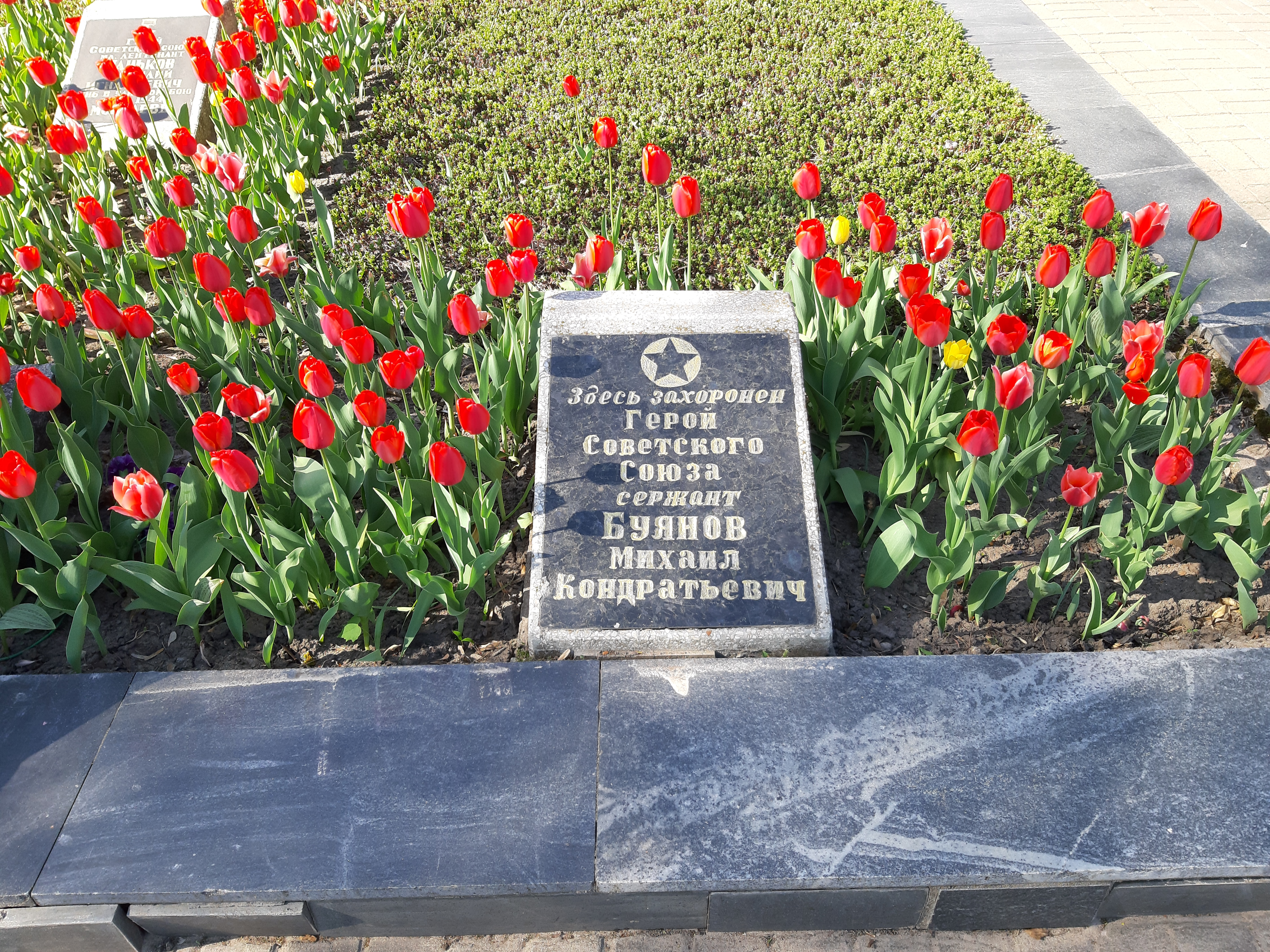 Магілёў. Вайсковыя могілкі